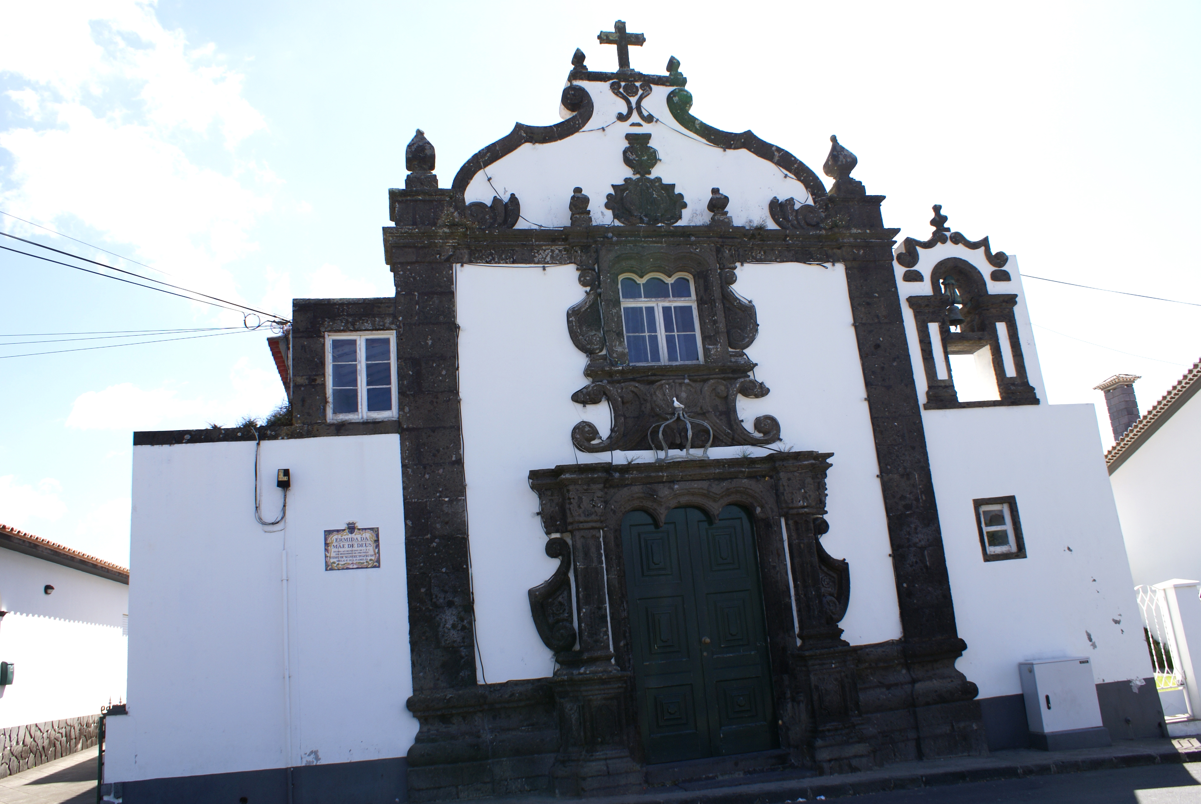 The front façade of the Chapel of Mãe de Deus, Vila Franca do Campo, São Miguel (Azores), Portugal